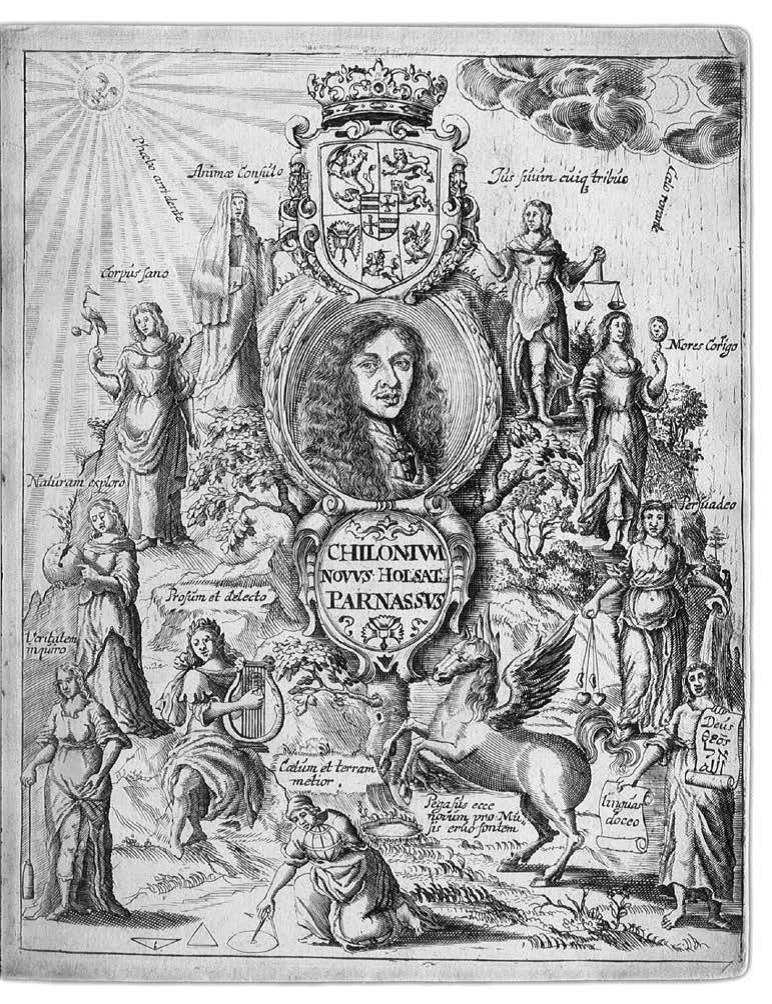 Das Titelblatt der Gründungsschrift der Christian-Albrechts-Universität zu Kiel.